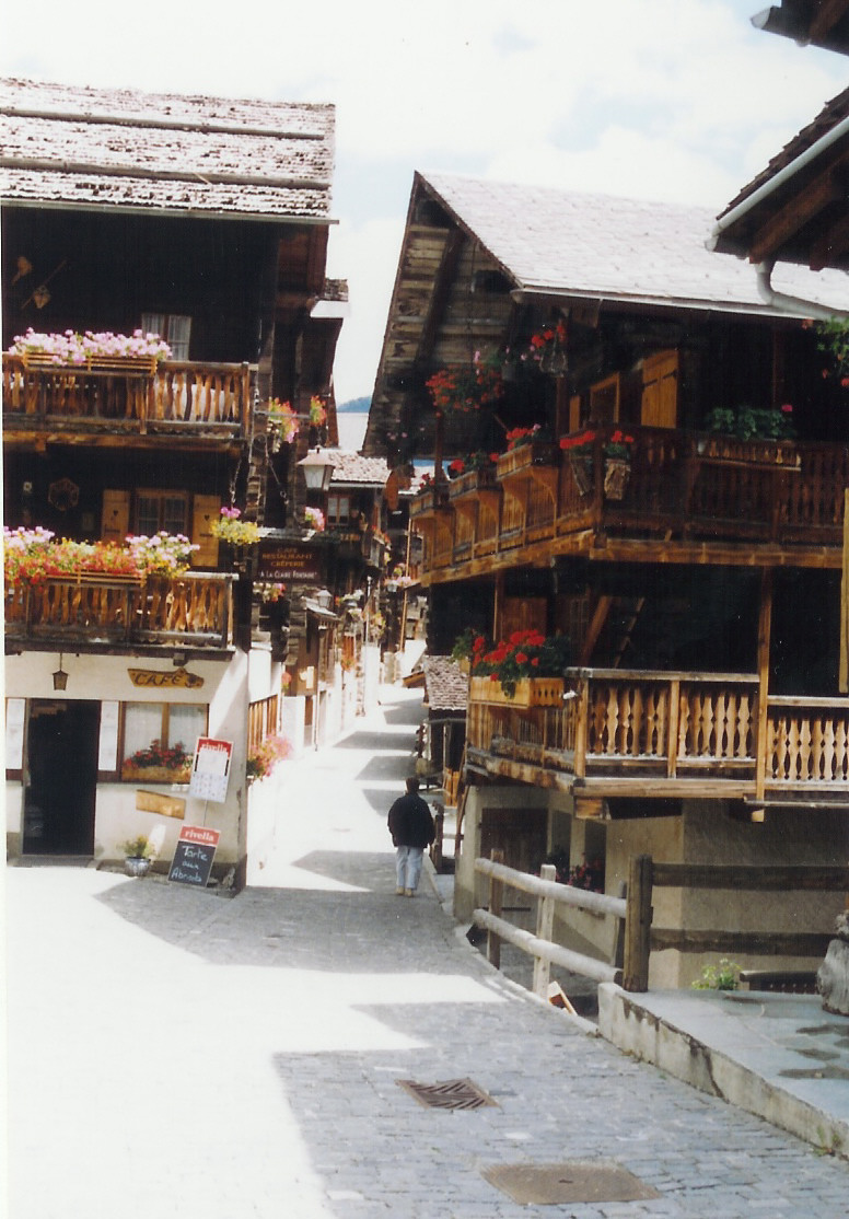 Zelfgemaakte foto. Foto gemaakt in een steegje van Grimentz.